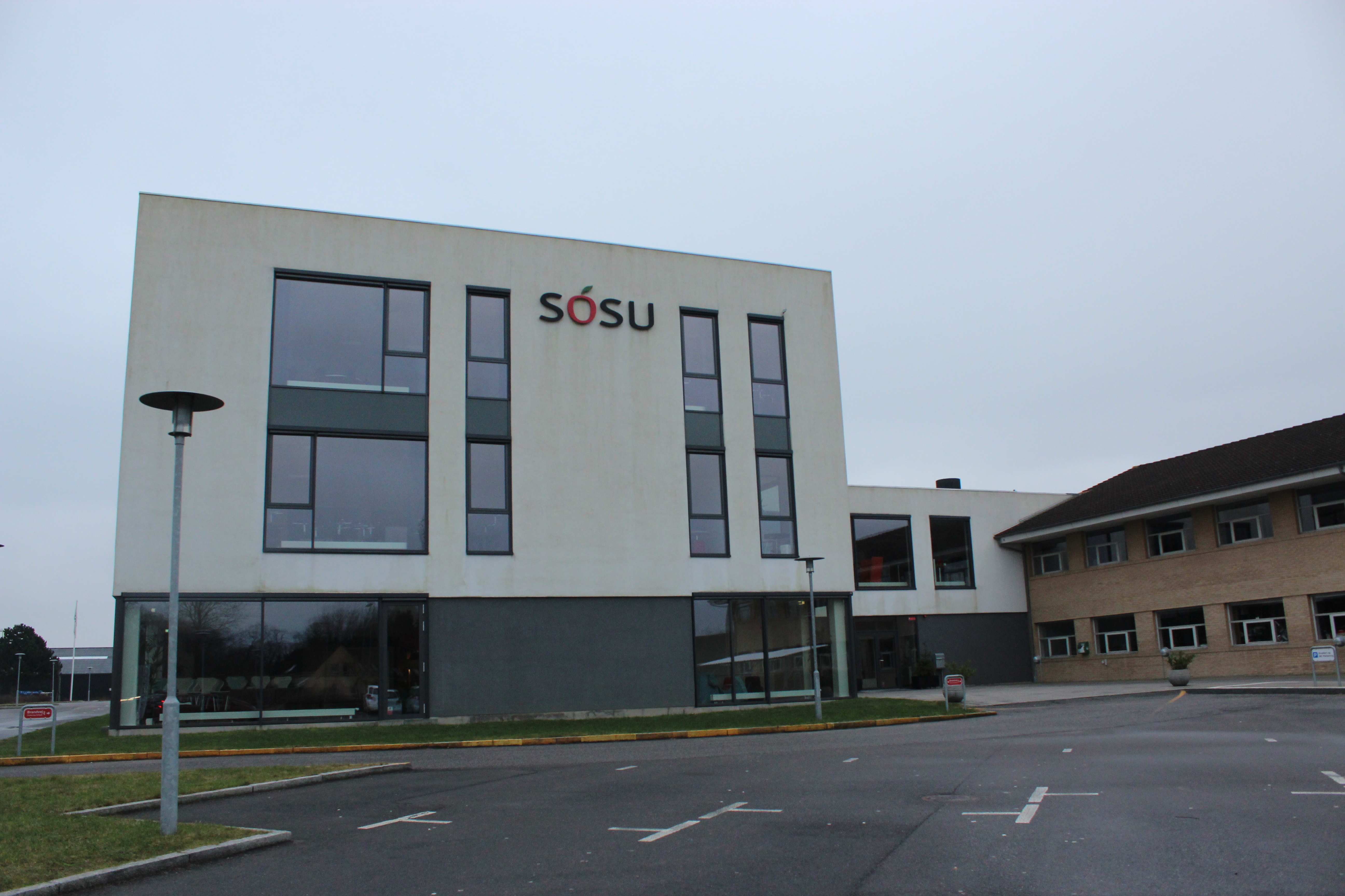 SOSU-uddannelsen i Nykøbing Falster